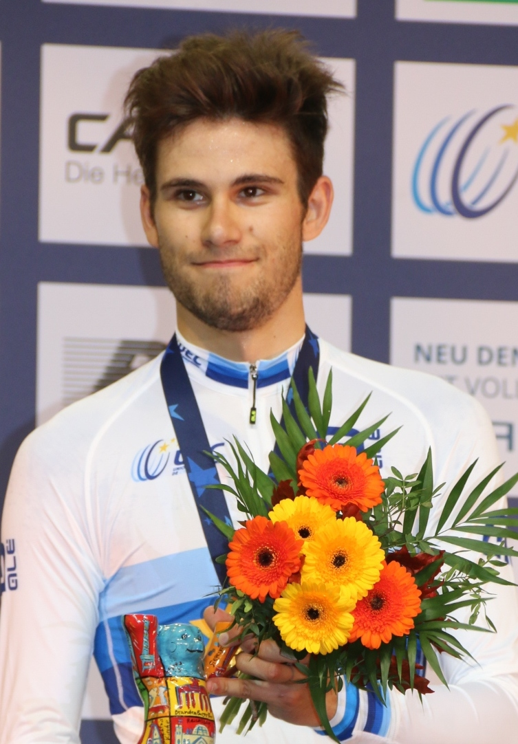 Filippo Ganna, ital. Radsportler - Gold in der Einerverfolgung